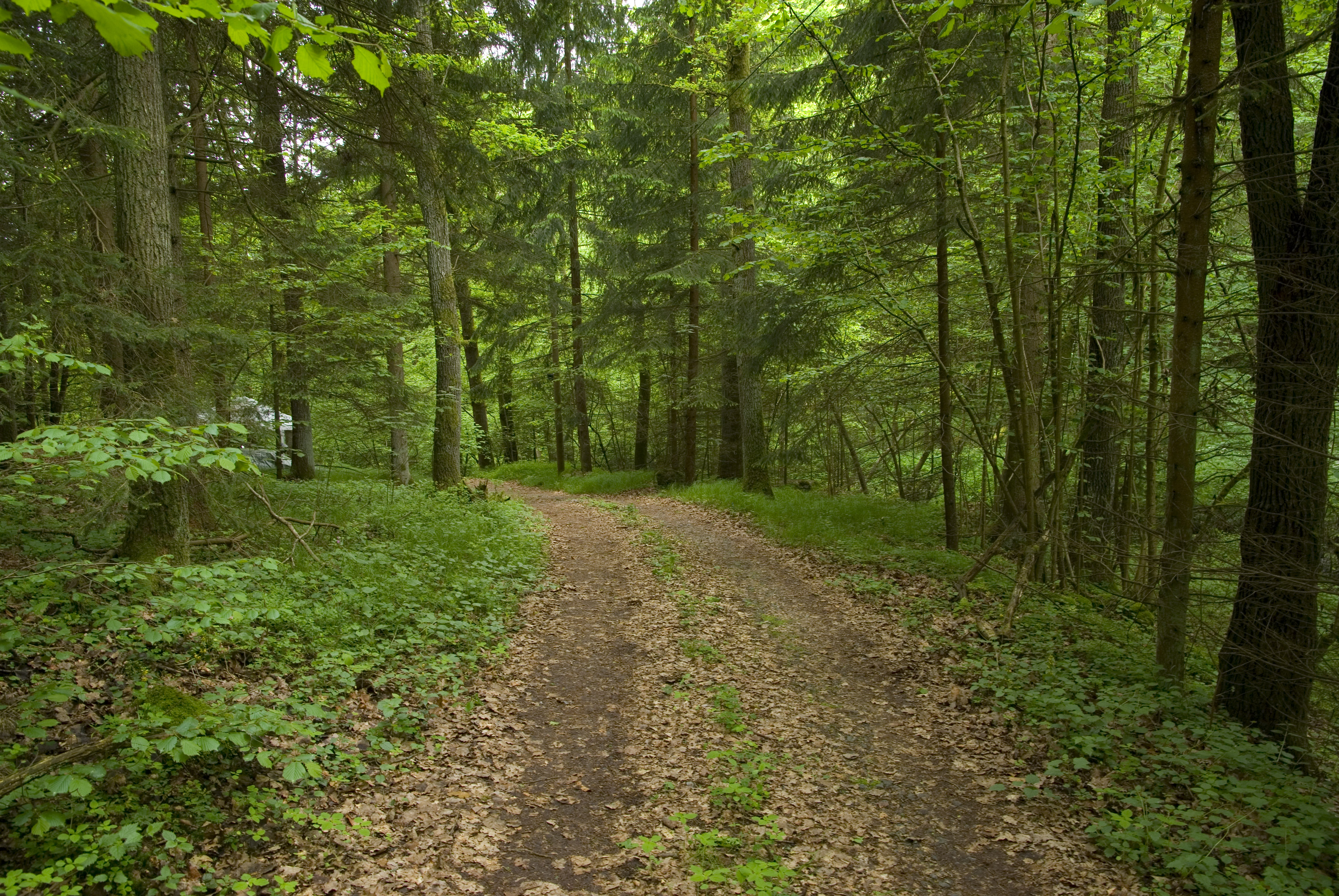 Waldweg bei Viechtach